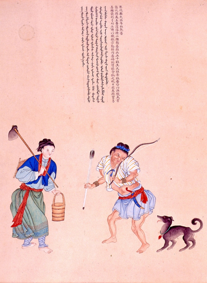 中文（香港）: 清 謝遂 職貢圖